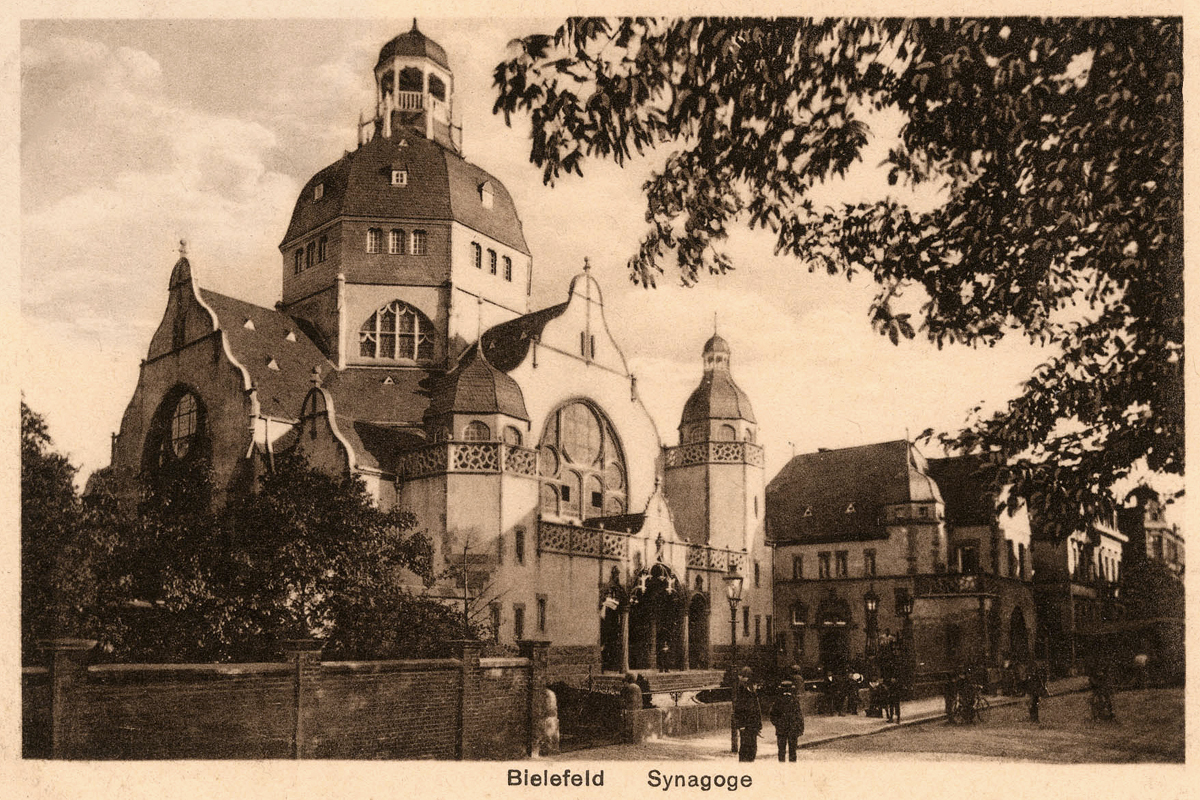 Alte Synagoge in Bielefeld erbaut 1905. Zerstört von Nationalsozialisten in der Pogromnacht 9. November 1938.